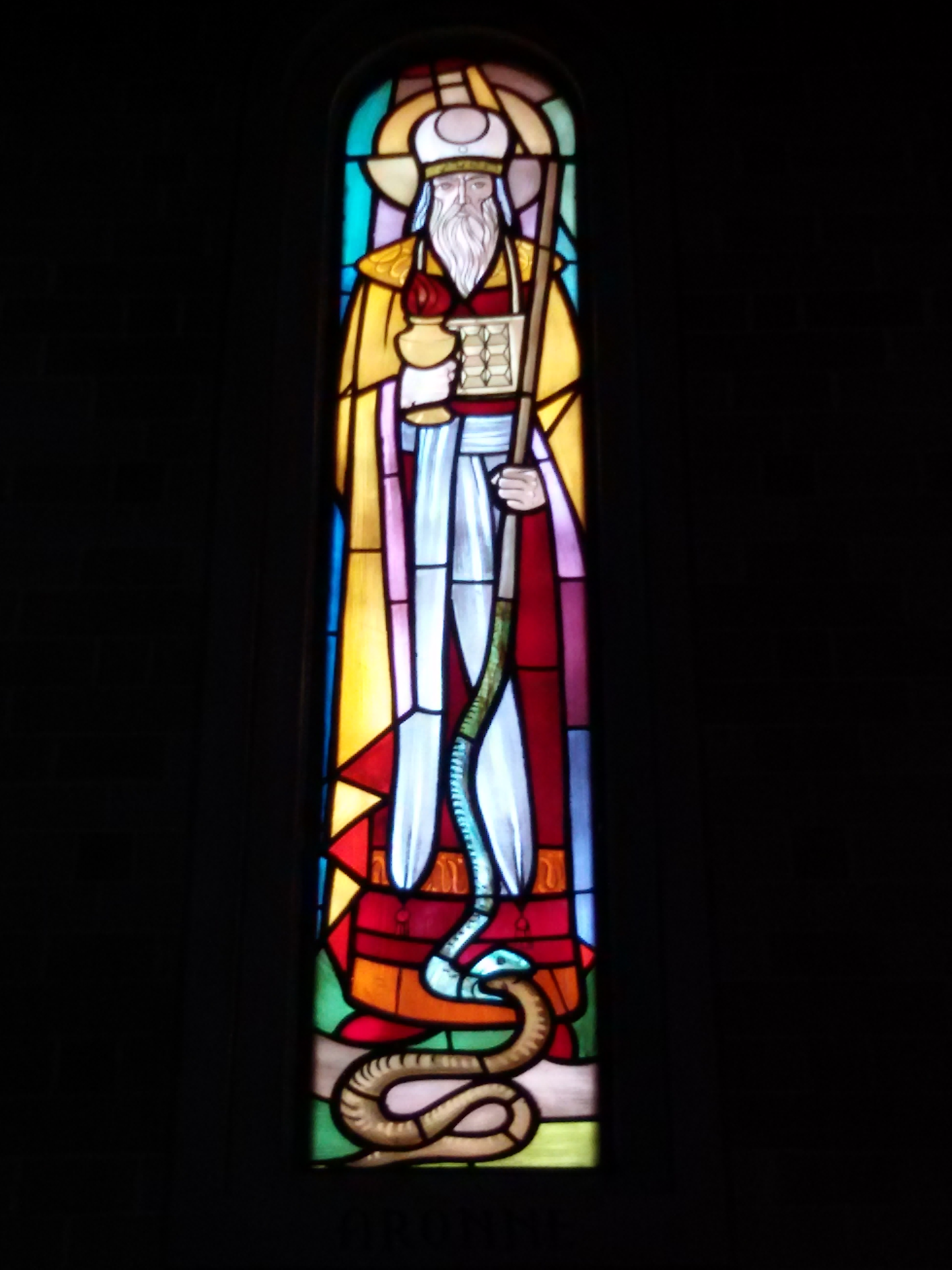 vetrata